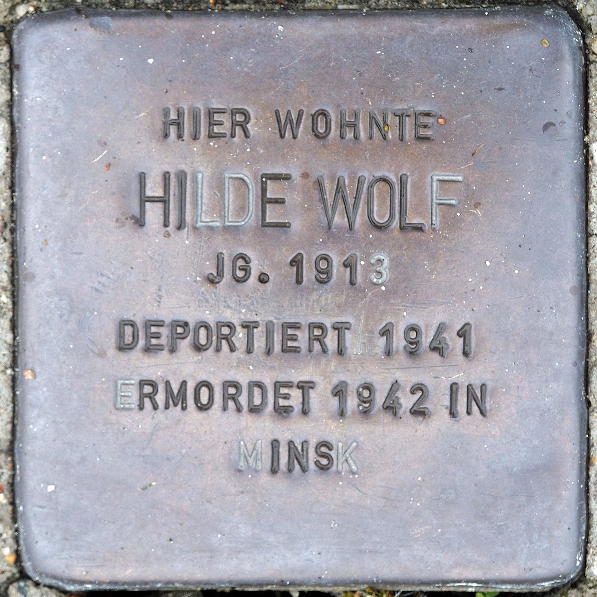 Stolpersteine Korschenbroich: Wolff, Hilde